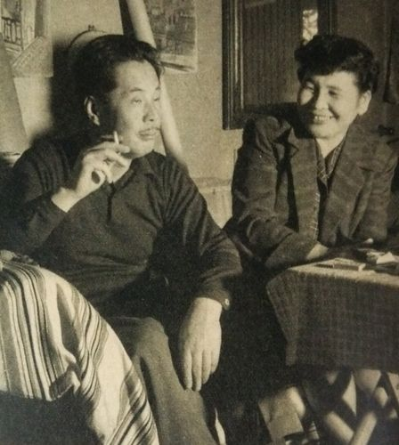 田村孝之介・ふき夫妻